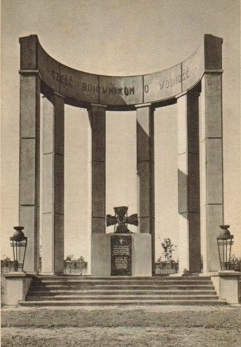 Kalisz, mauzoleum żołnierzy Legionów Polskich (destroyed)